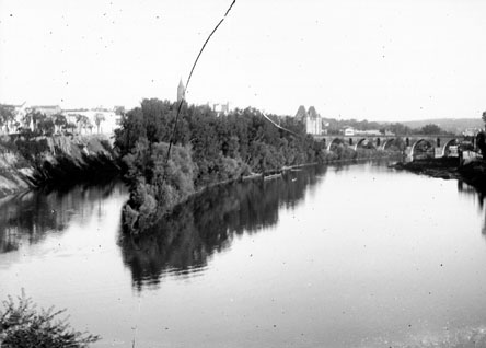 Fonds Trutat - Photographie ancienne Cote : TRU C 1082 Localisation : Fonds ancien (S 30) Original non communicable Titre : Montauban, 10 août 1893 Auteur : Trutat, Eugène Rôle de l’auteur : Photographe Lieu de création : Montauban (Tarn-et-Garonne) Date de création : 1893 Mesures : : 6 x 9 cm Observations : Notes de la main de E.Trutat : "Obj. Turillon" Plaque cassée Mot(s)-clé(s) : -- Ville -- Rivière -- Arbre -- Rive -- Clocher -- Pont -- Eté -- Montauban (Tarn-et-Garonne) -- Montauban (Tarn-et-Garonne ; canton) -- Midi-Pyrénées (France) -- Eglise Saint-Jacques (Montauban) -- Pont Vieux (Montauban) -- Tarn (France ; rivière) -- Tescou (France ; rivière) -- 19e siècle, 4e quart -- 13e siècle -- 14e siècle Médium : Photographies -- Négatifs sur plaque de verre -- Noir et blanc -- Turillon -- Paysages Bibliothèque de Toulouse. Domaine public